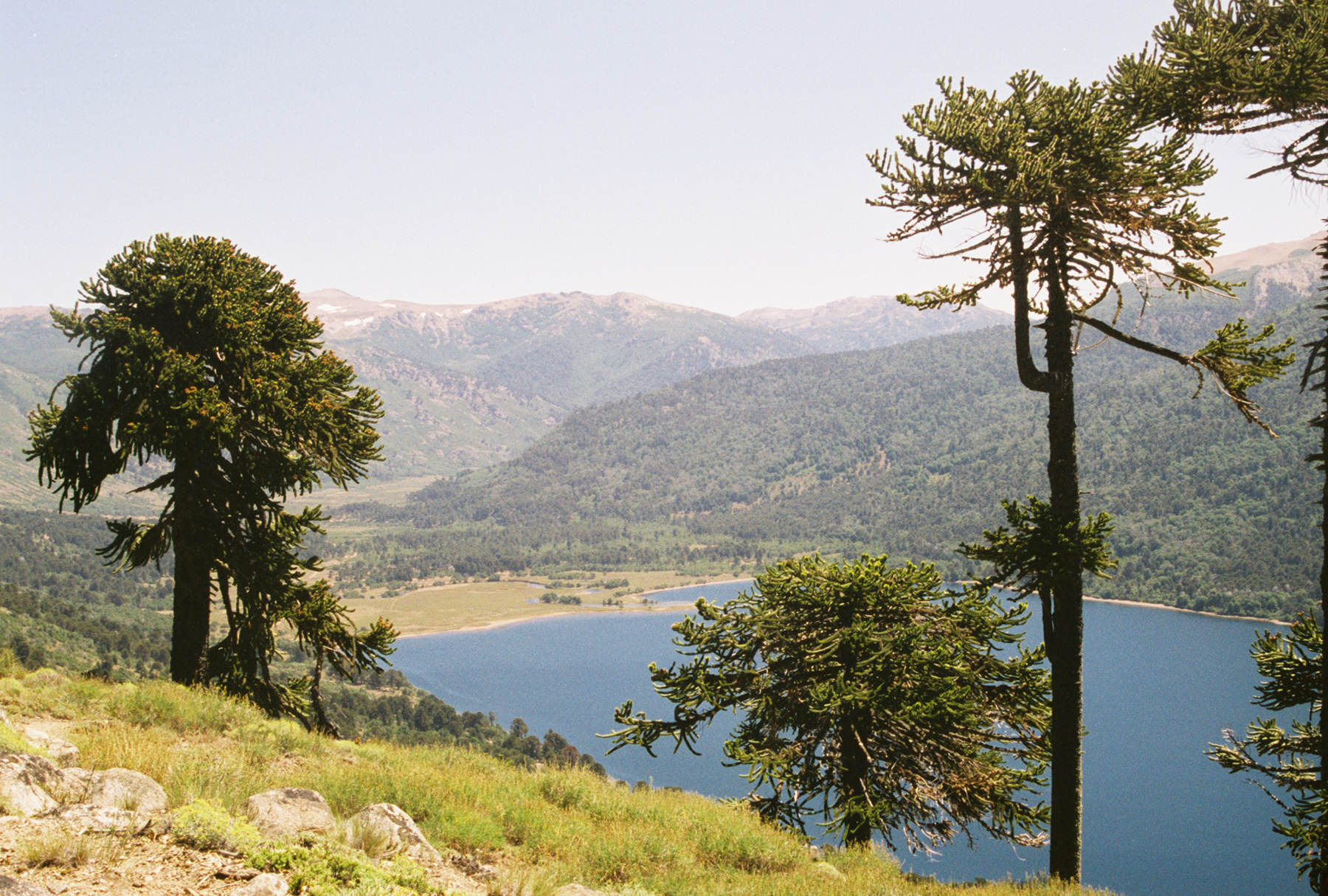 Araucaria araucana trees in Parque Nacional Lanin, Argentina